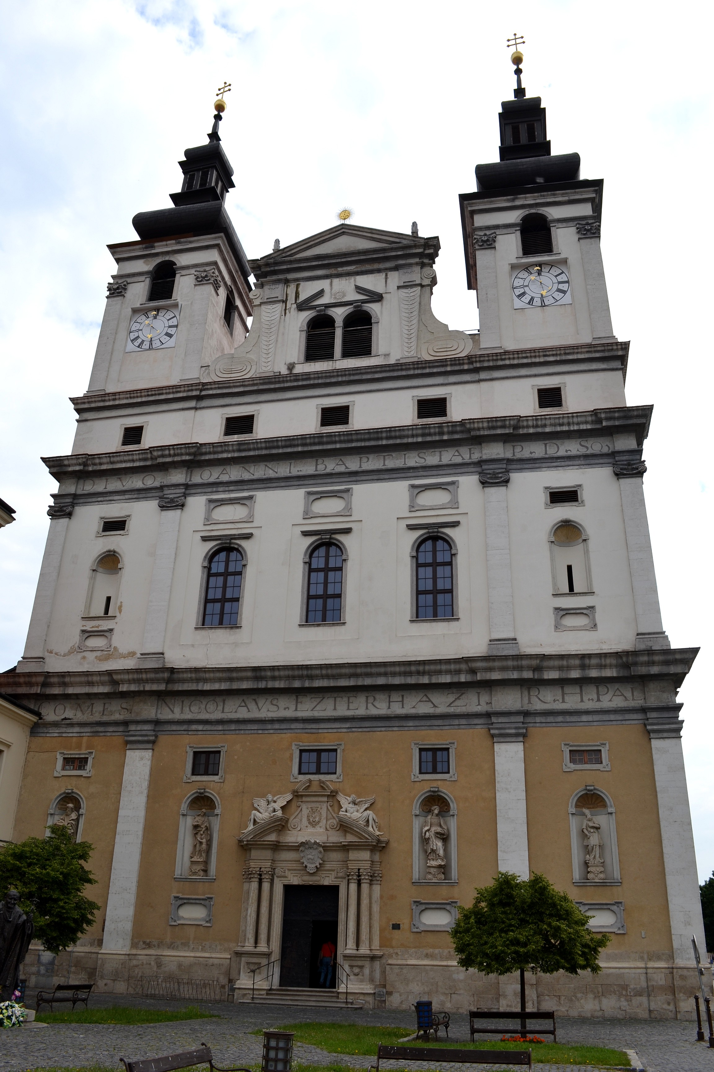 Hlavné, západné priečelie